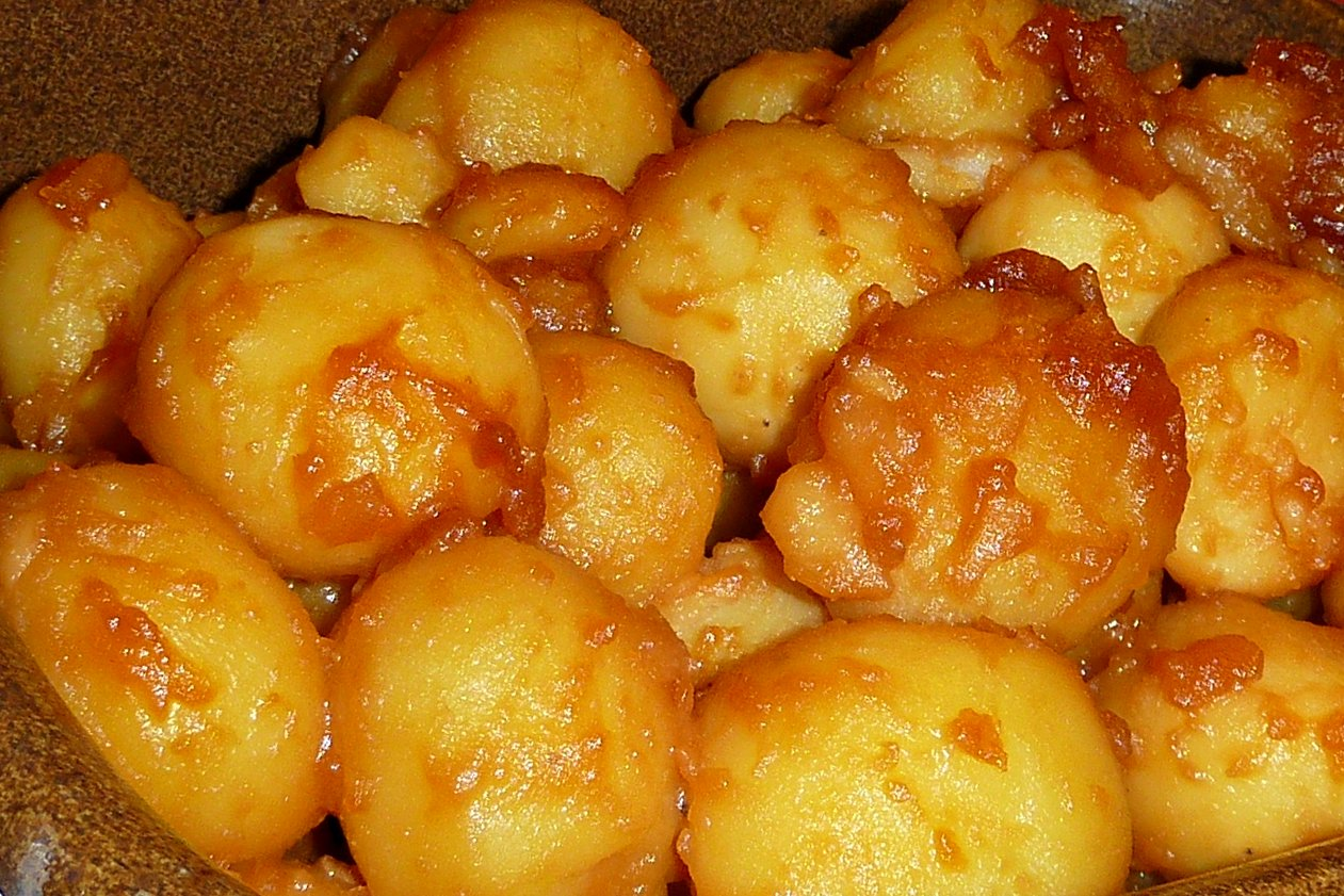 Brunede kartofler ("karamellisierte Kartoffeln"), eine Spezialität der dänischen Küche und traditioneller Bestandteil des Weihnachtsessens an Heiligabend.